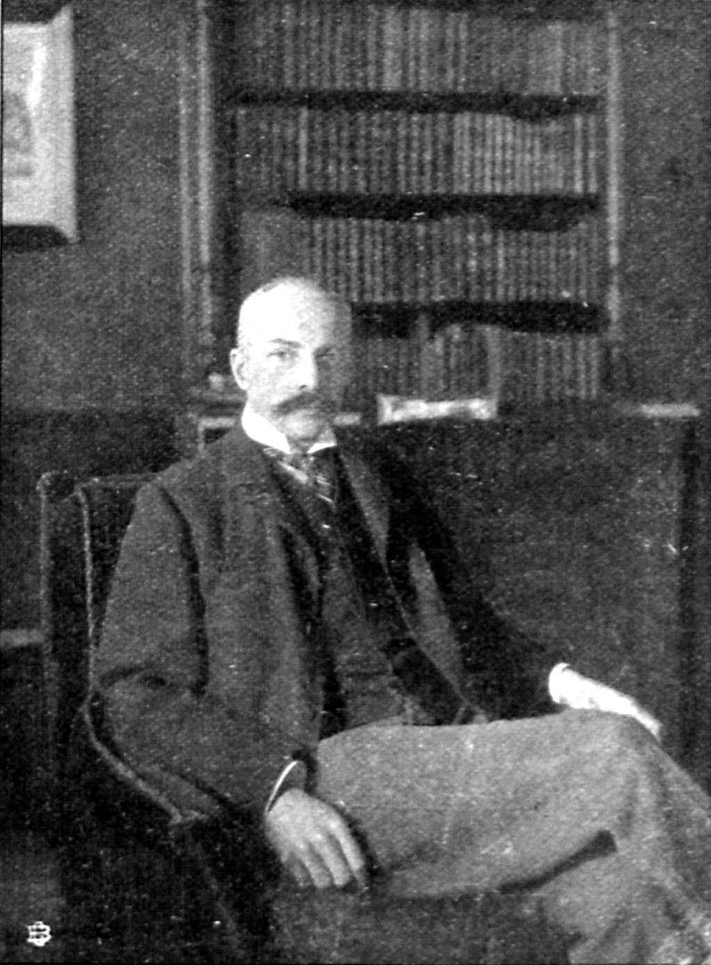 Exzellenz von Tschirschky und Bögendorff , bisher kgl. preuß. Gesandter bei den Hansestädten und Mecklenburg, jetzt Staatssekretär des Auswärtigen Amtes.